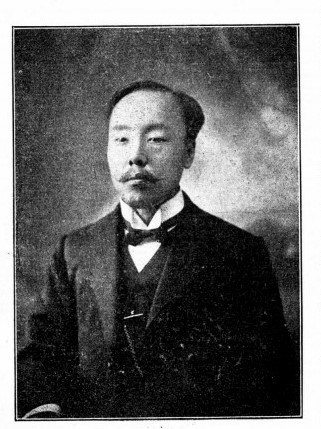 中文（台灣）: 國會議員肖像